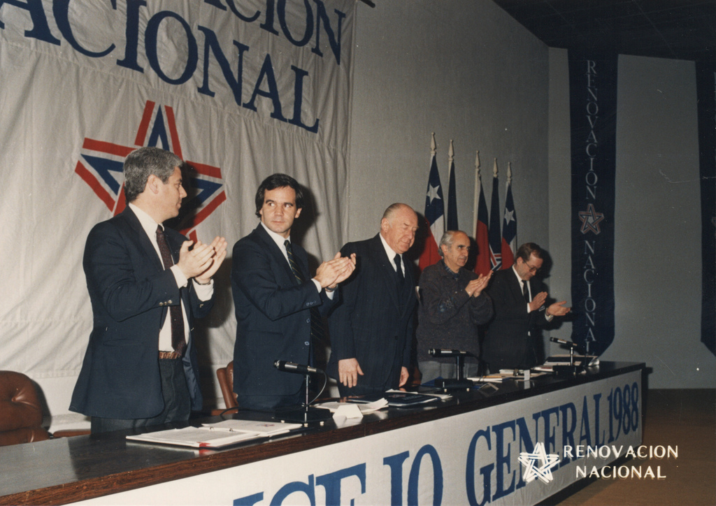 Miembros de Renovación Nacional (RN) en 1988. Renovación Nacional (RN) es un partido político chileno de centroderecha, fundado el 29 de abril de 1987. El partido se caracteriza por ser la cara moderada de la Alianza por Chile; coalición que comparte con la Unión Demócrata Independiente (UDI).